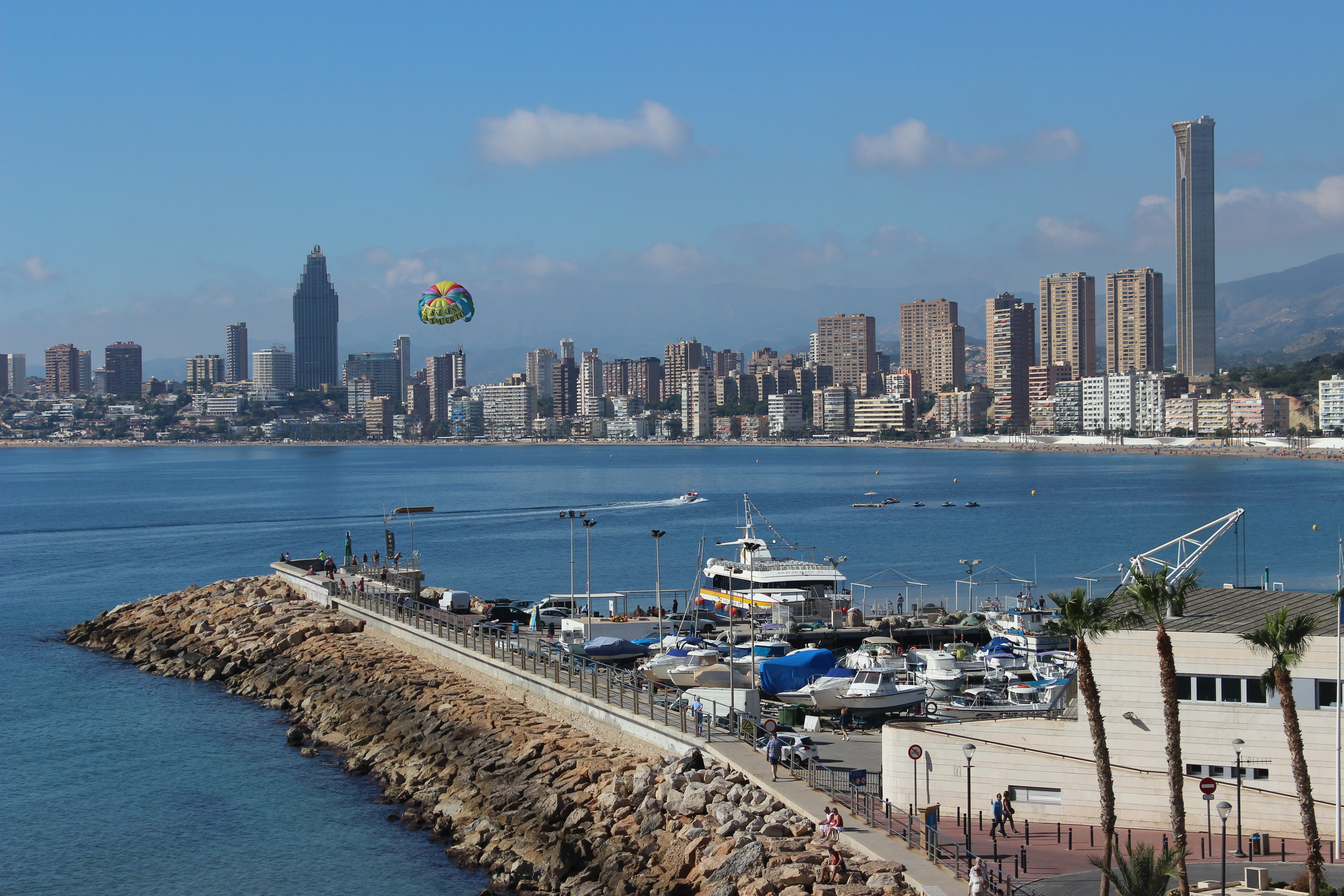 Benidorm en 2015.